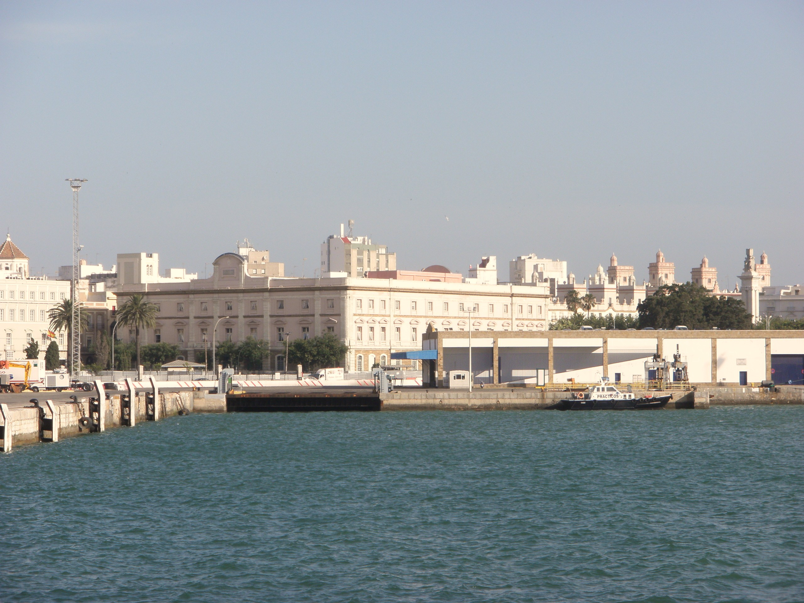 Palacio de la Aduana, Monumento a las Cortes, Casa de las cuatro Torres, Cádiz, España.